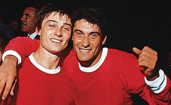 Mura y Decaría, en pleno festejo luego de ganar la segunda Libertadores con Independiente.